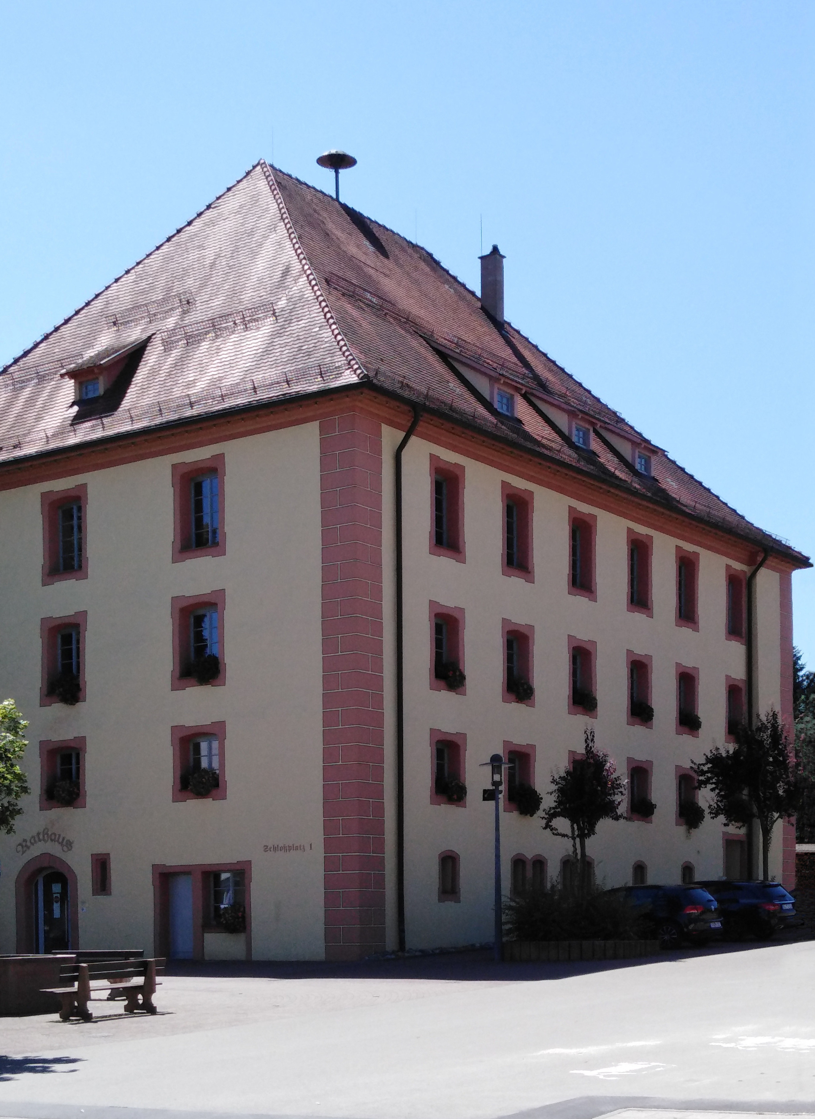 Schloss Wellendingen (Ldkr. Rottweil) - heute Rathaus